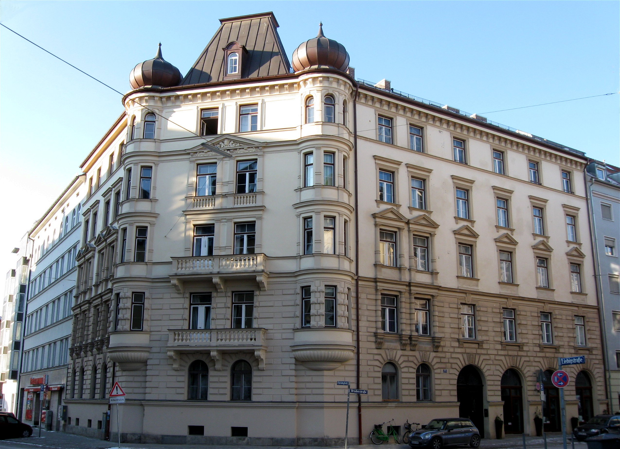 Bruderstraße 1; Mietshaus, Neurenaissance, mit zwei kuppelgekrönten Erkern an der abgeschrägten Ecke, 1886 von Carl Vent; städtebaulicher Abschluss der Liebigstraße